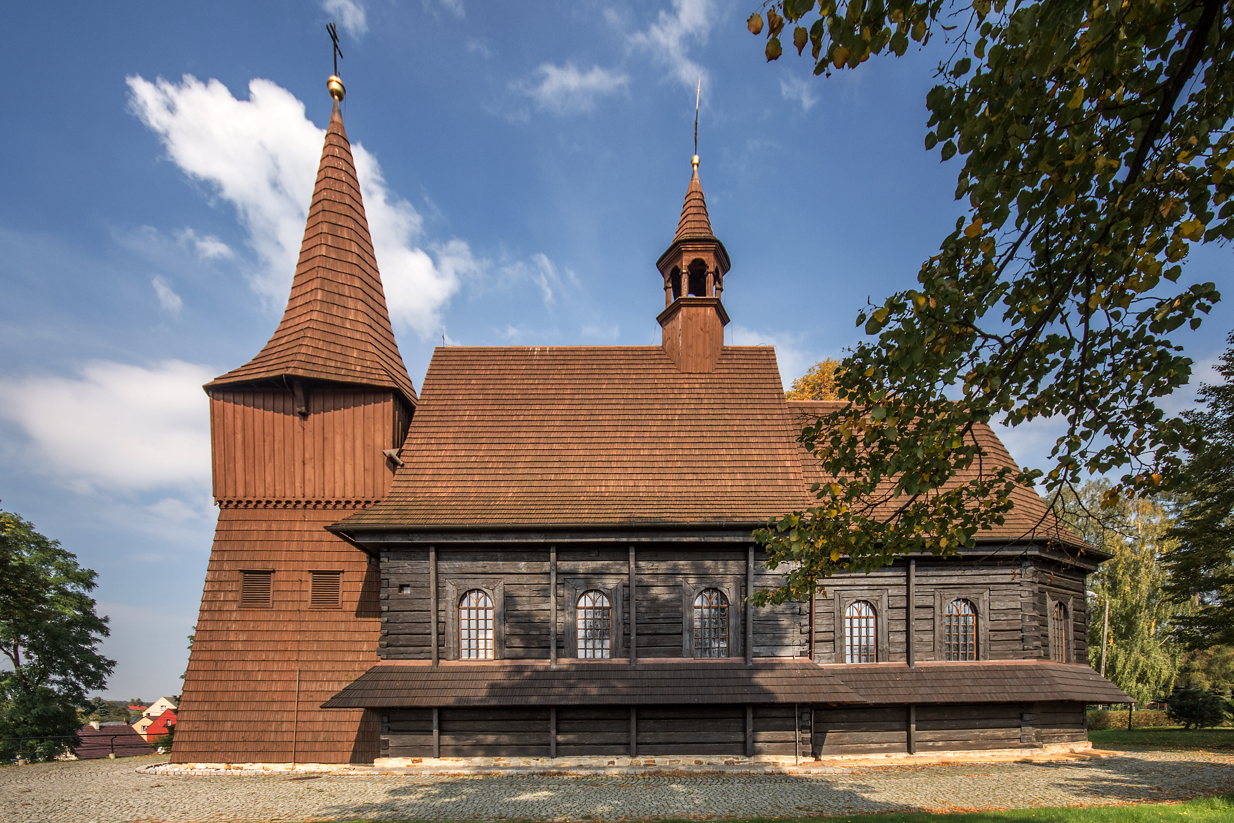 Żernica, Kościół św. Michała Archanioła w Żernicy